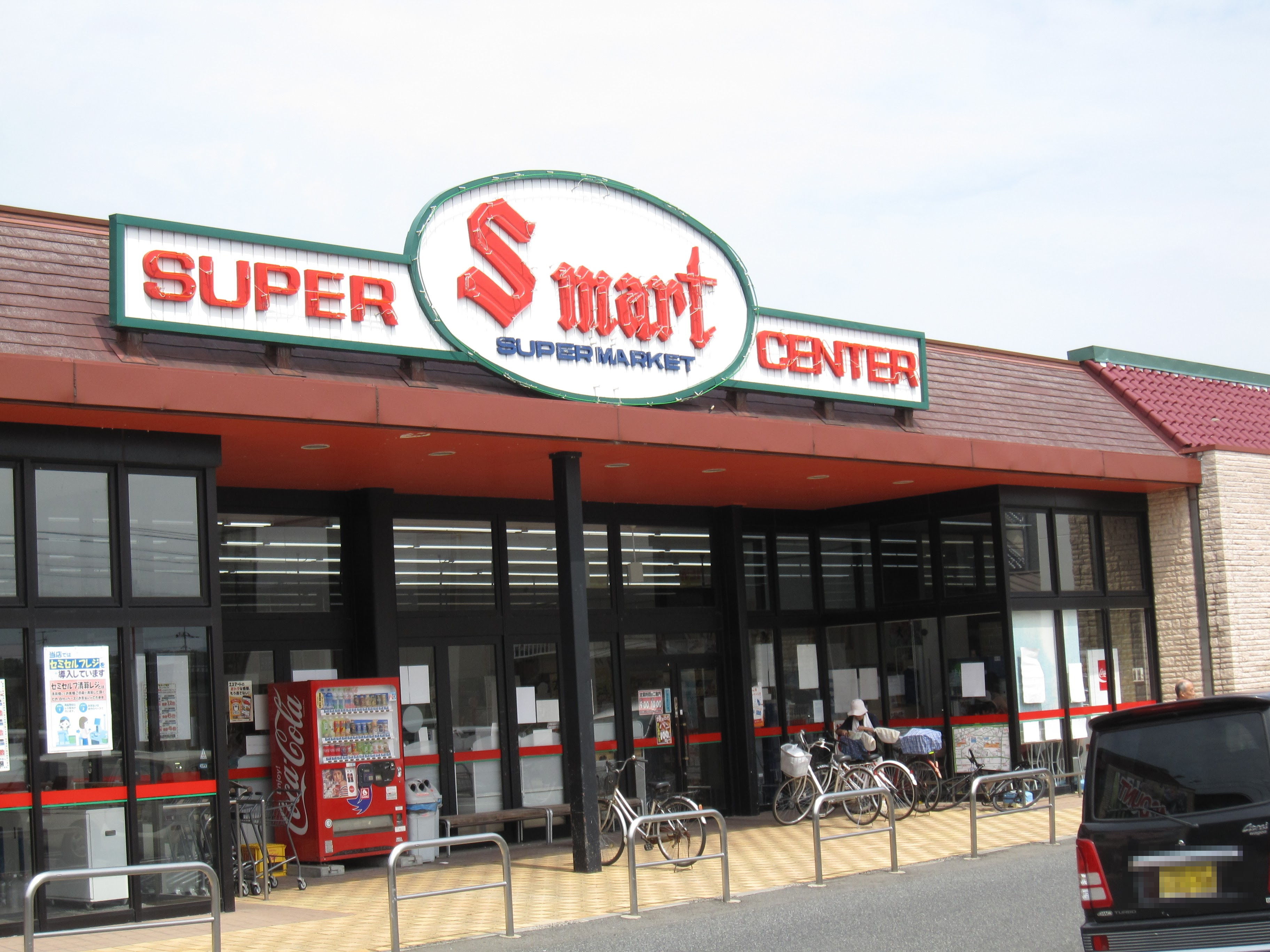 Sマート湖山店